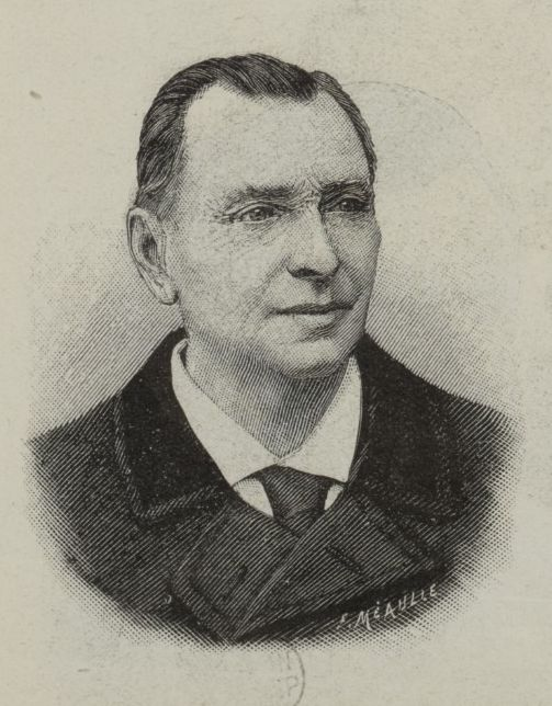 Louis Péricaud, acteur de théâtre